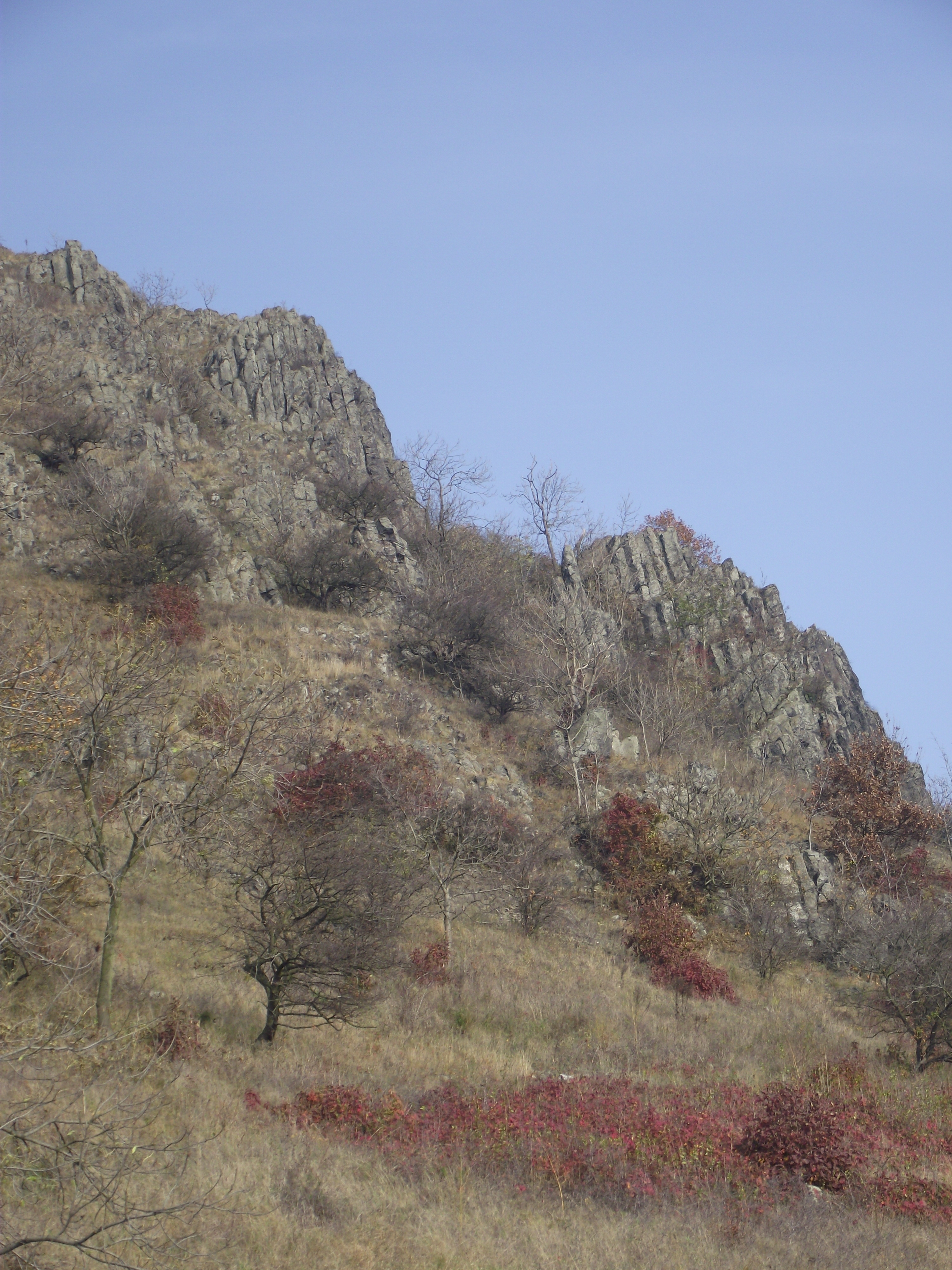 Svah s vystupujícím čedičem.